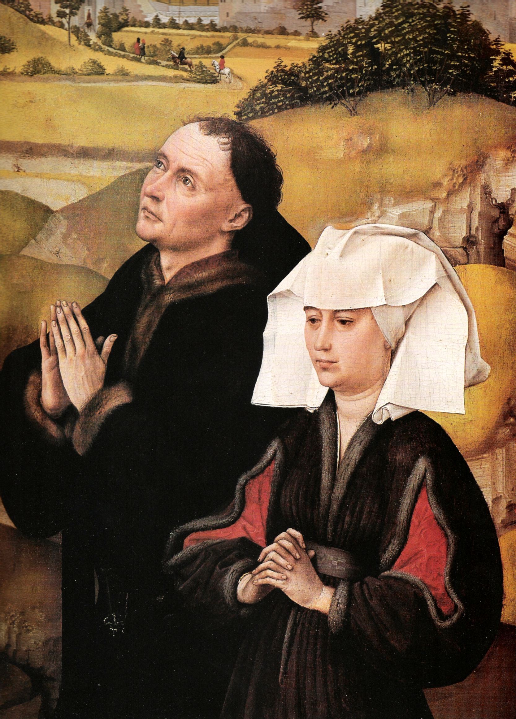 Stifterehepaar des Kreuzigungstriptychons detail: central panel